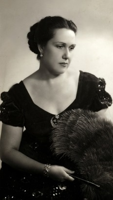 María Greus Calatayud actriz y soprano